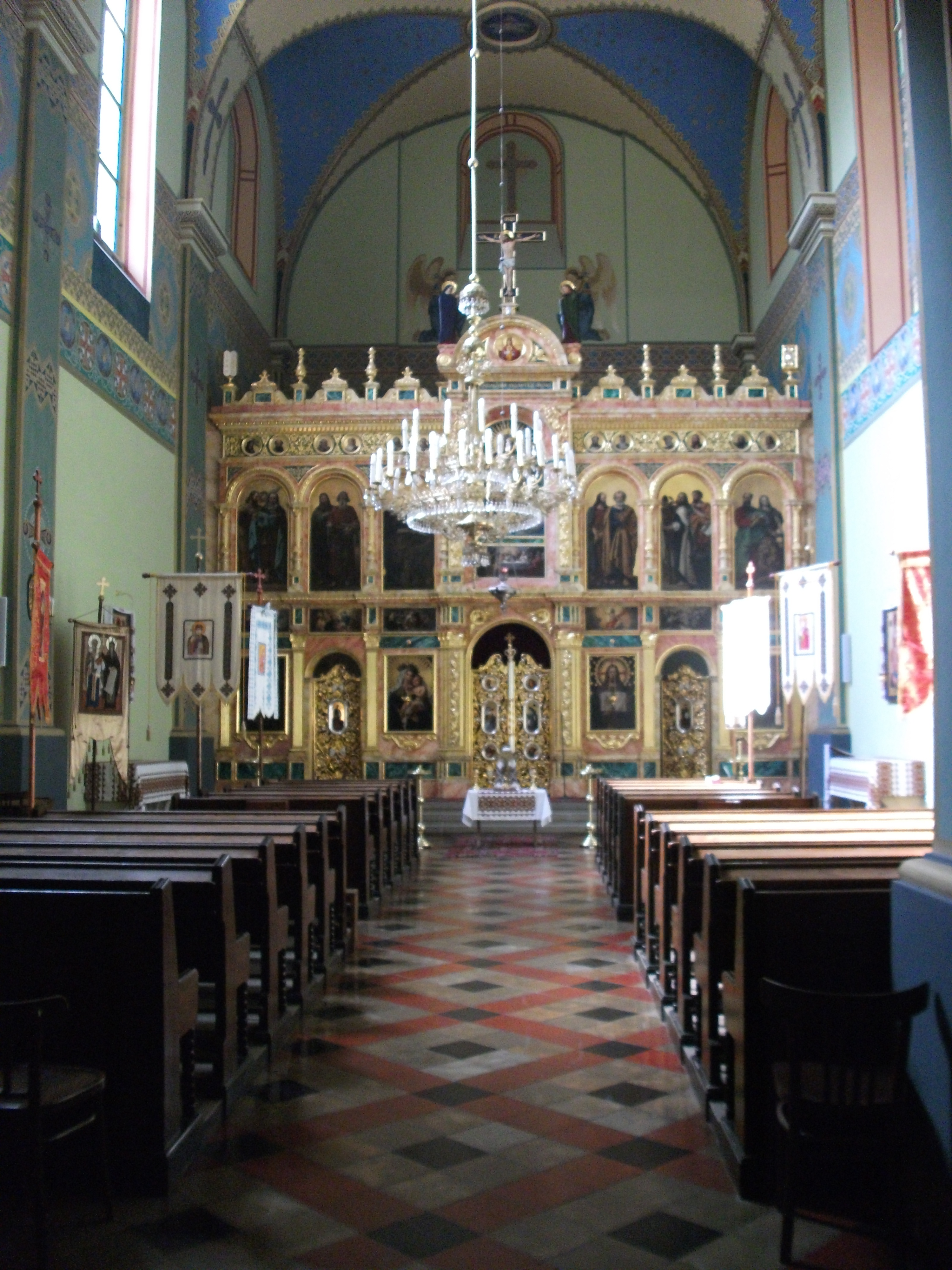 Wnętrze cerkwi greckokatolickiej p.w. Podwyższenia Krzyża Świętego w Krakowie